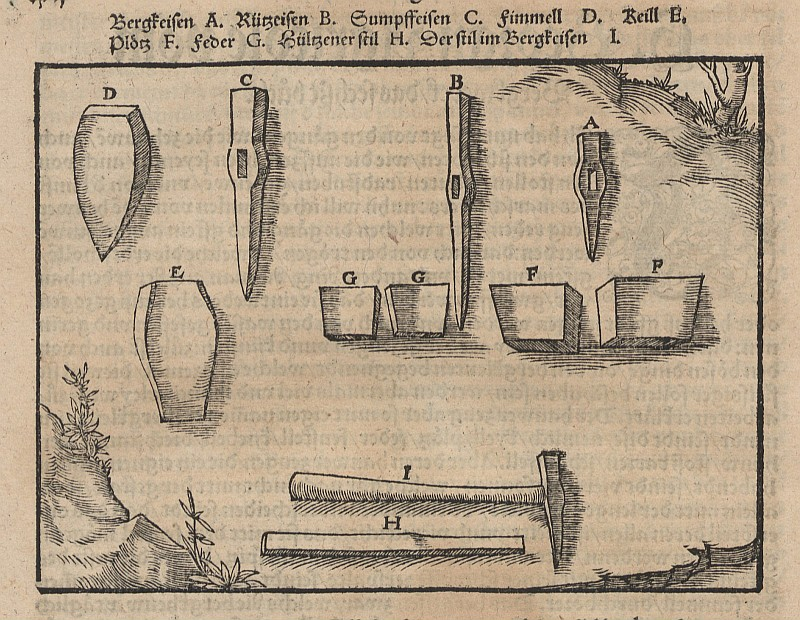 Original image description from the Deutsche Fotothek Bergwerk & Bergbau & Bergeisen & Ritzeisen & Sumpfeisen & Fimmel & Keil & Pötz & Feder